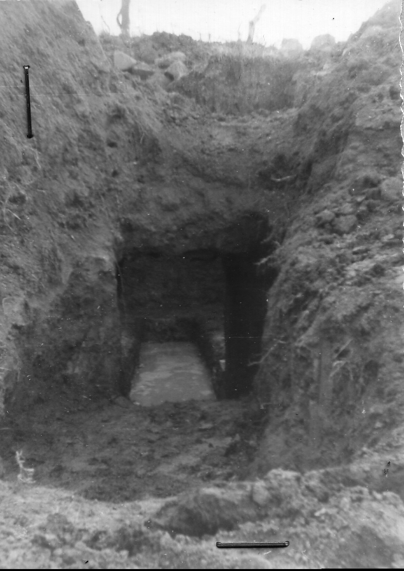 Ustrinum (lat. - forno crematorio) di tipo rettangolare fotografato dal Prof. Giancarlo Susini nel 1959, sito nella valle di Sanguineto - Tuoro sul Trasimeno. Il Prof. Susini lo identificò come ustrinum di fattura numidica e lo censì insieme agli altri, di tipo circolare, che erano stati ritrovati nell'area e ricondotti agli eventi immediatamente successivi alla battaglia del Trasimeno. Le dimensioni dell'opera raffigurata erano lung. 5,08 mt, larg 3,19, prof. tot. 2,40 mt. Per maggiori informazioni si veda Susini G., Ricerche sula battaglia del Trasimeno, Accademia Etrusca di Cortona, Annuario XI, nuova serie - Vol. IV, 1960, pagg. 84-89 e cosa lo stesso autore riporta nelle Appendici I e II in L'archeologia della guerra annibalica, Accademia Etrusca di Cortona, Annuario XII, nuova serie - Vol. V, 1964